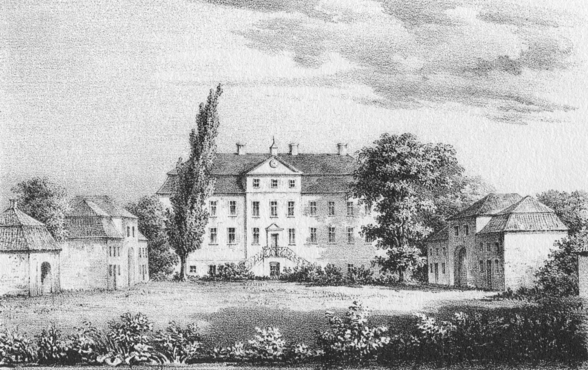 Lithografie des Schlosses Heringhausen in Lippstadt-Herringhausen